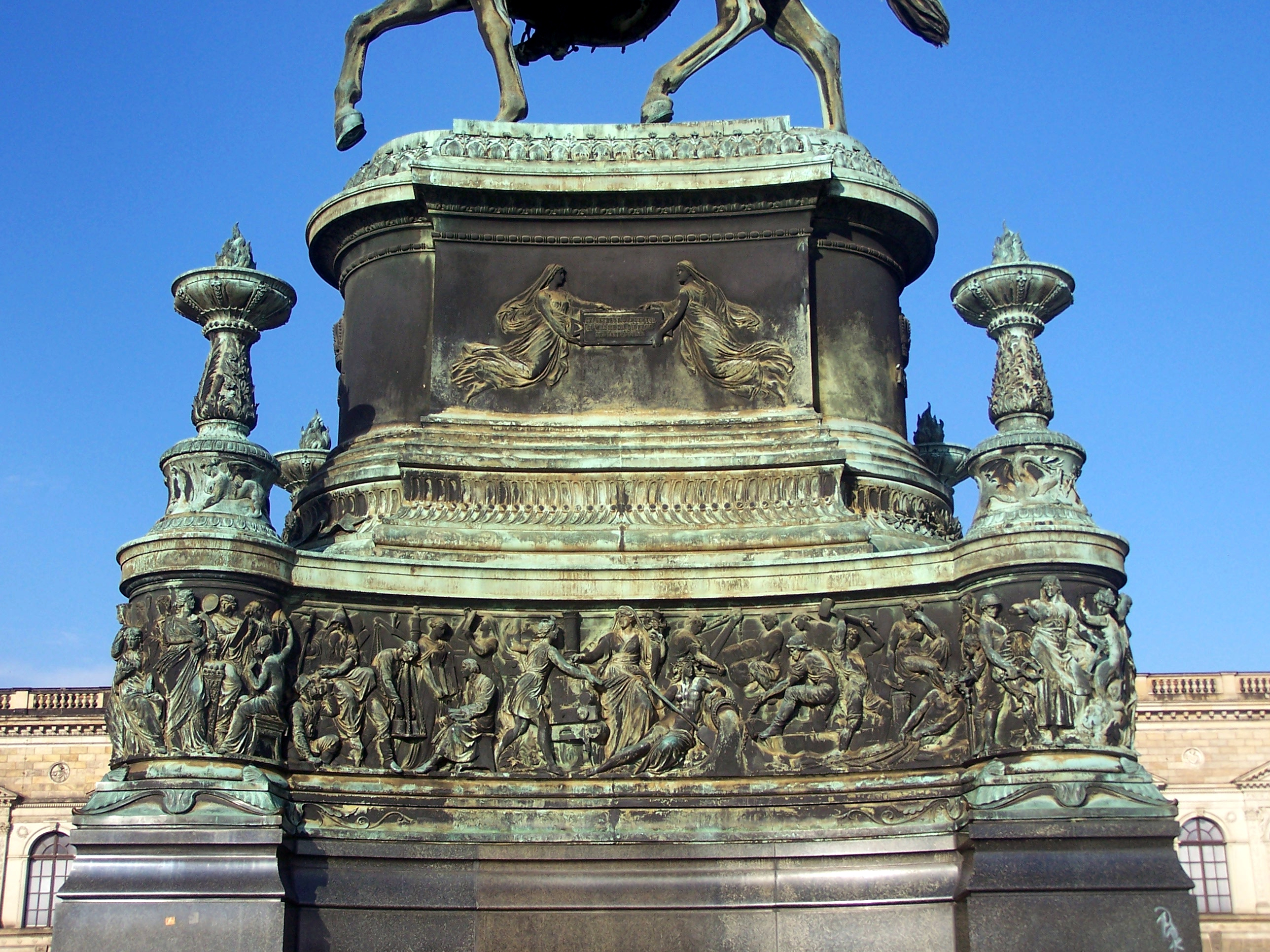 Dresden, Reiterstandbild König Johann auf dem Theaterplatz